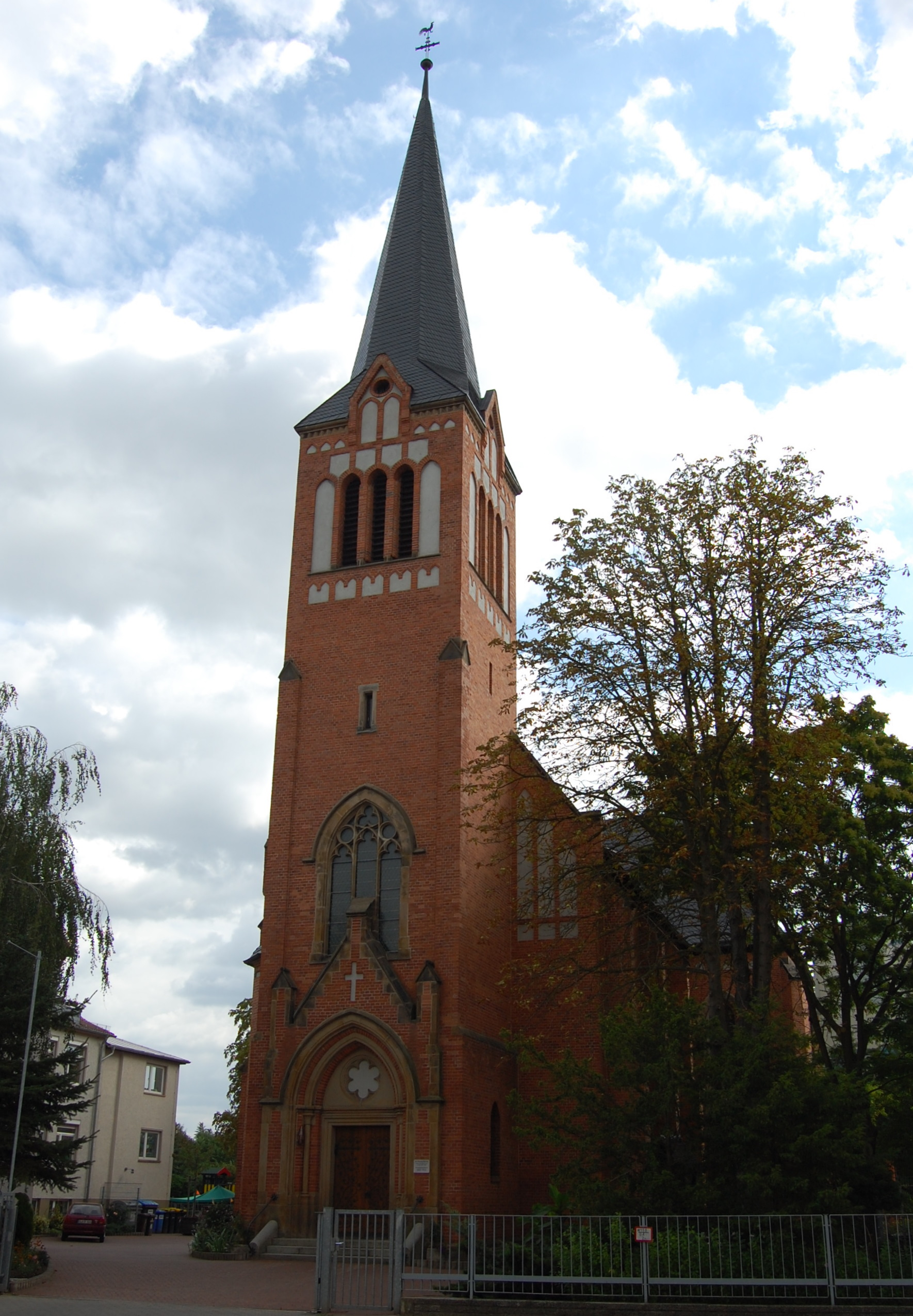 katholische Marienkirche in Schönebeck (Elbe)